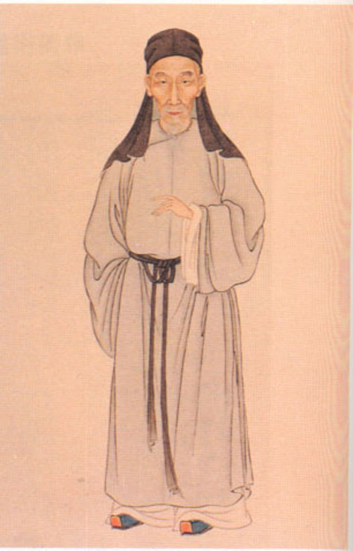 王夫之，清朝学者。Wang Fuzhi